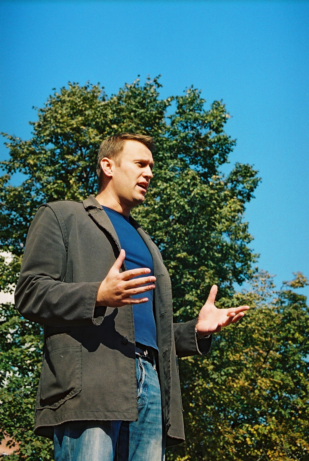 Алексей Навальный, 2006 год, пикет движения ДА! в защиту ПТУ